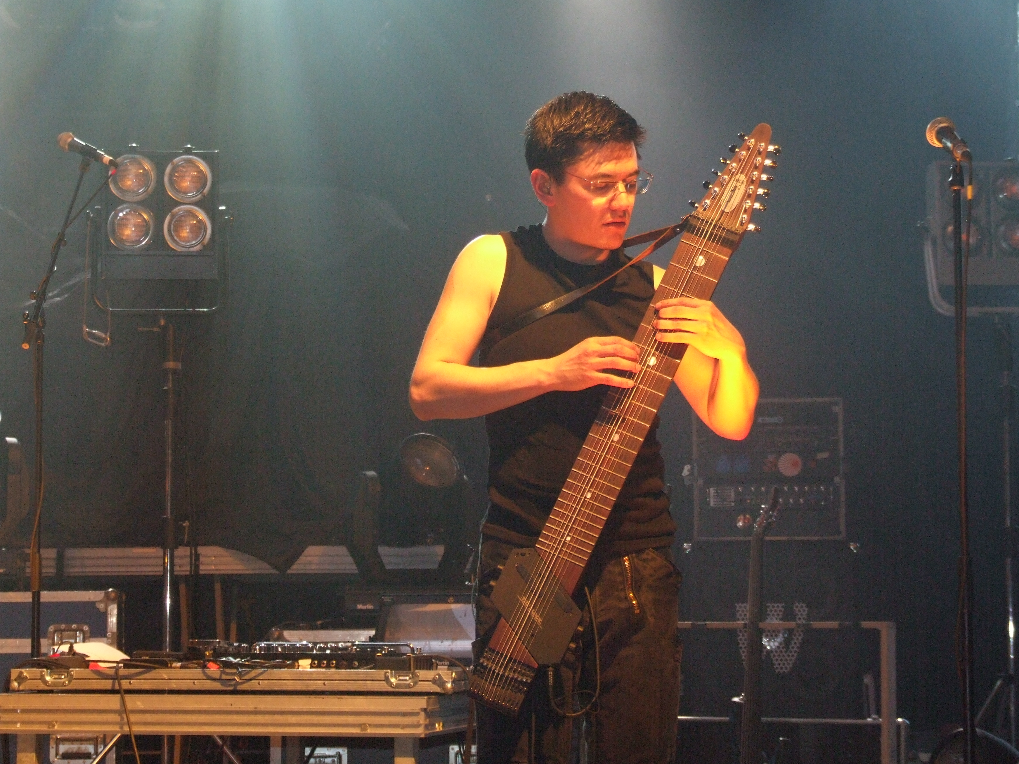 "Bruder Frank", 2009 Bassist der deutschen Mittelalter- und Rockgruppe Saltatio Mortis, Konzert am 13. Juli 2009 in der Sommerfesthalle,, Deutschland